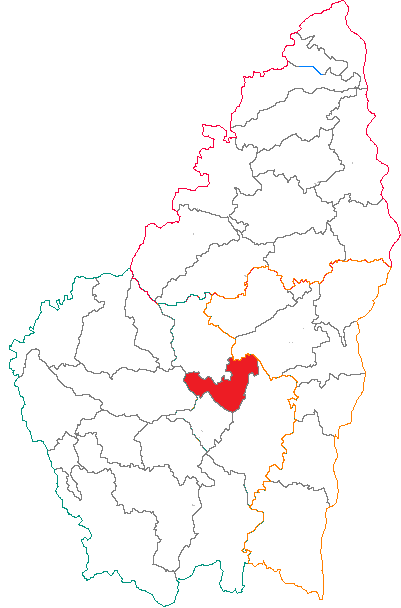 Situation du canton dans le département de l'Ardèche (France)